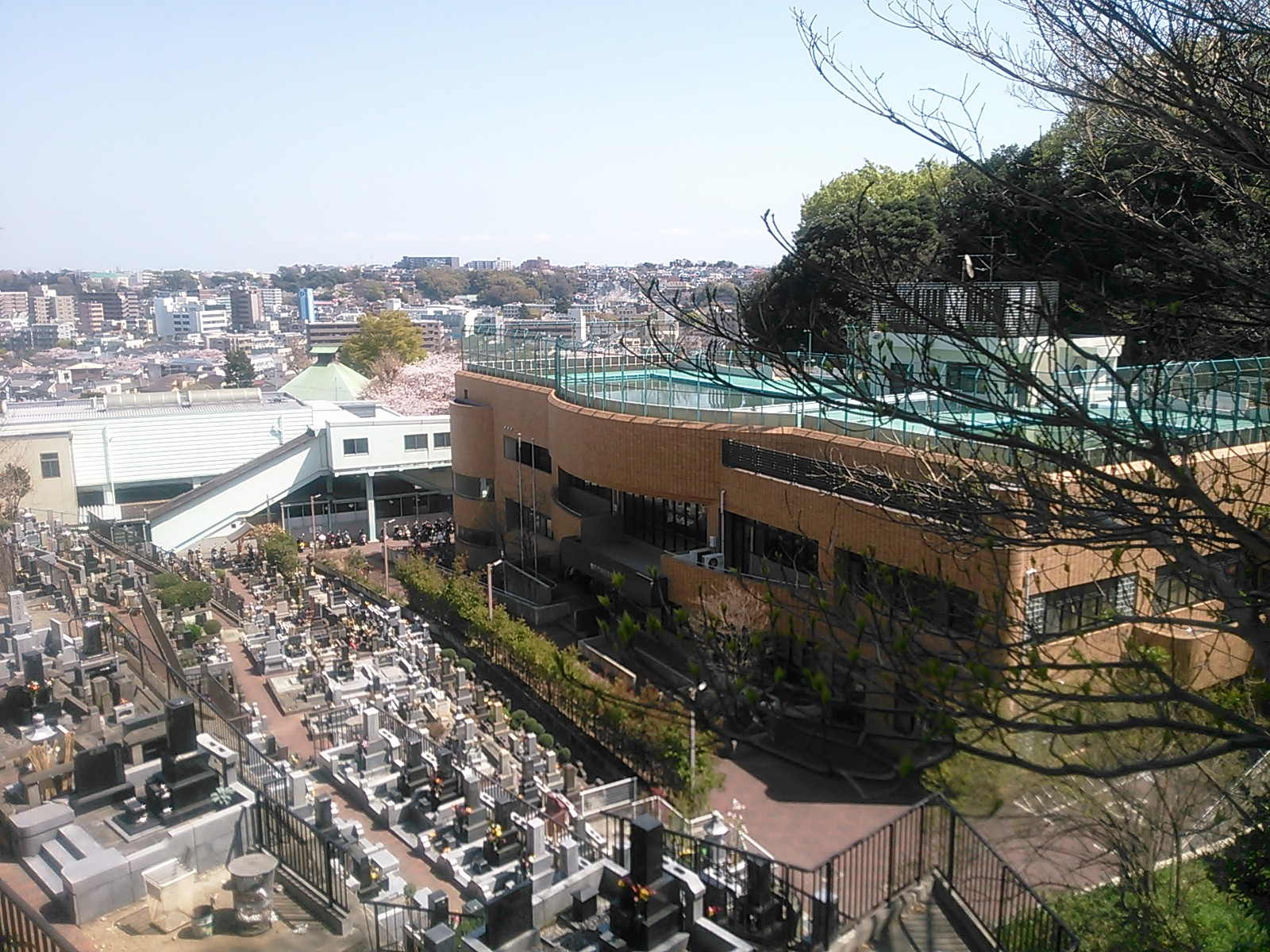 横浜市南区、横浜市立南図書館